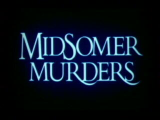 Заставка телесериала «Убийства в Мидсомере» («Чисто английские убийство»).